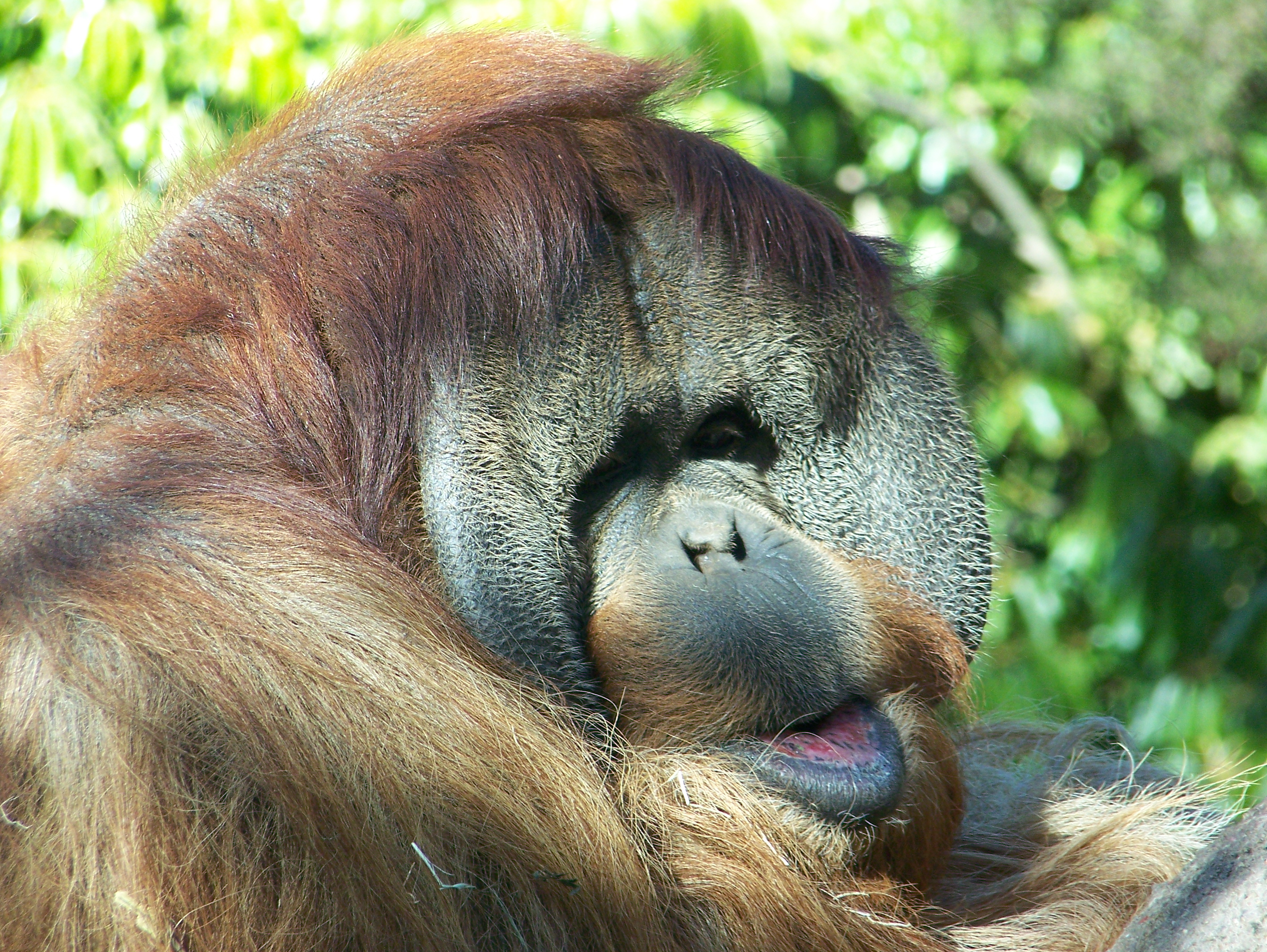 An orangutan at the San Diego Zoo